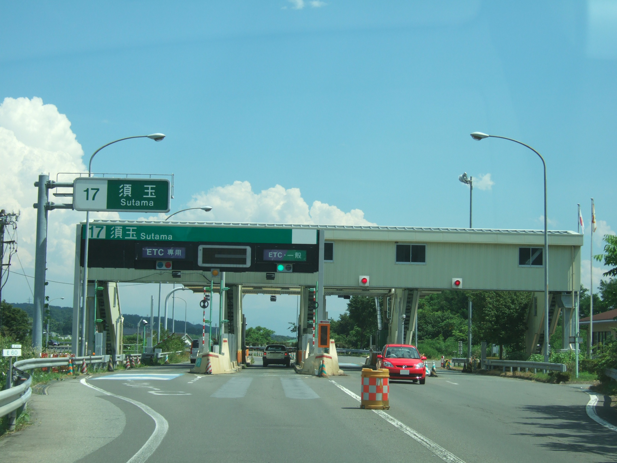 須玉インターチェンジ